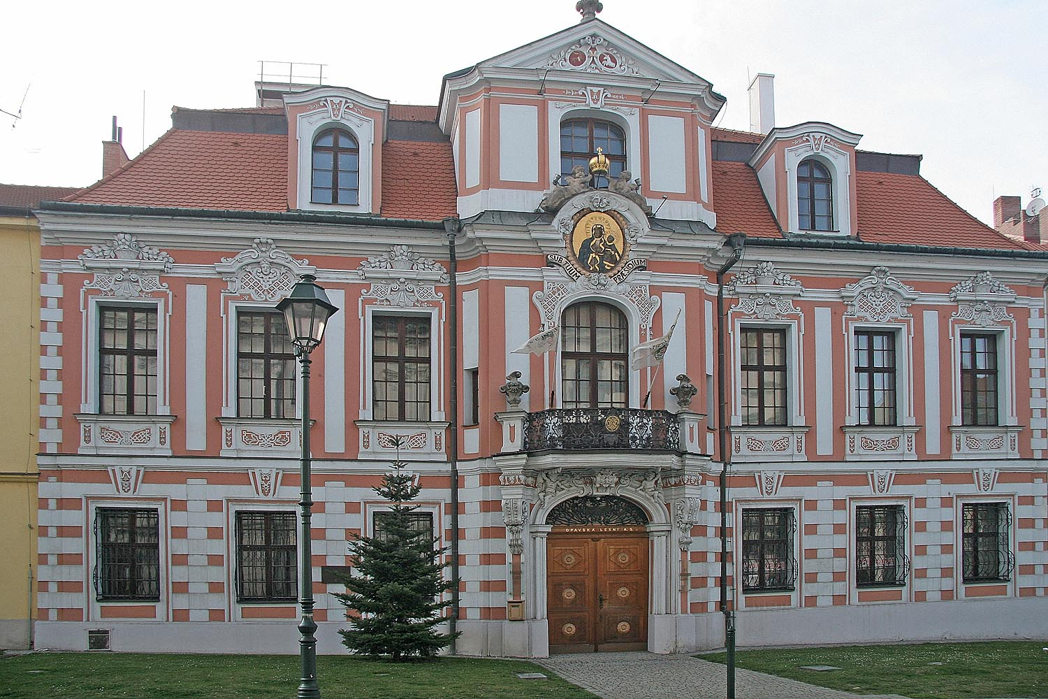 Barokní Sobkův palác v Opavě, district Opava, Czech Republic